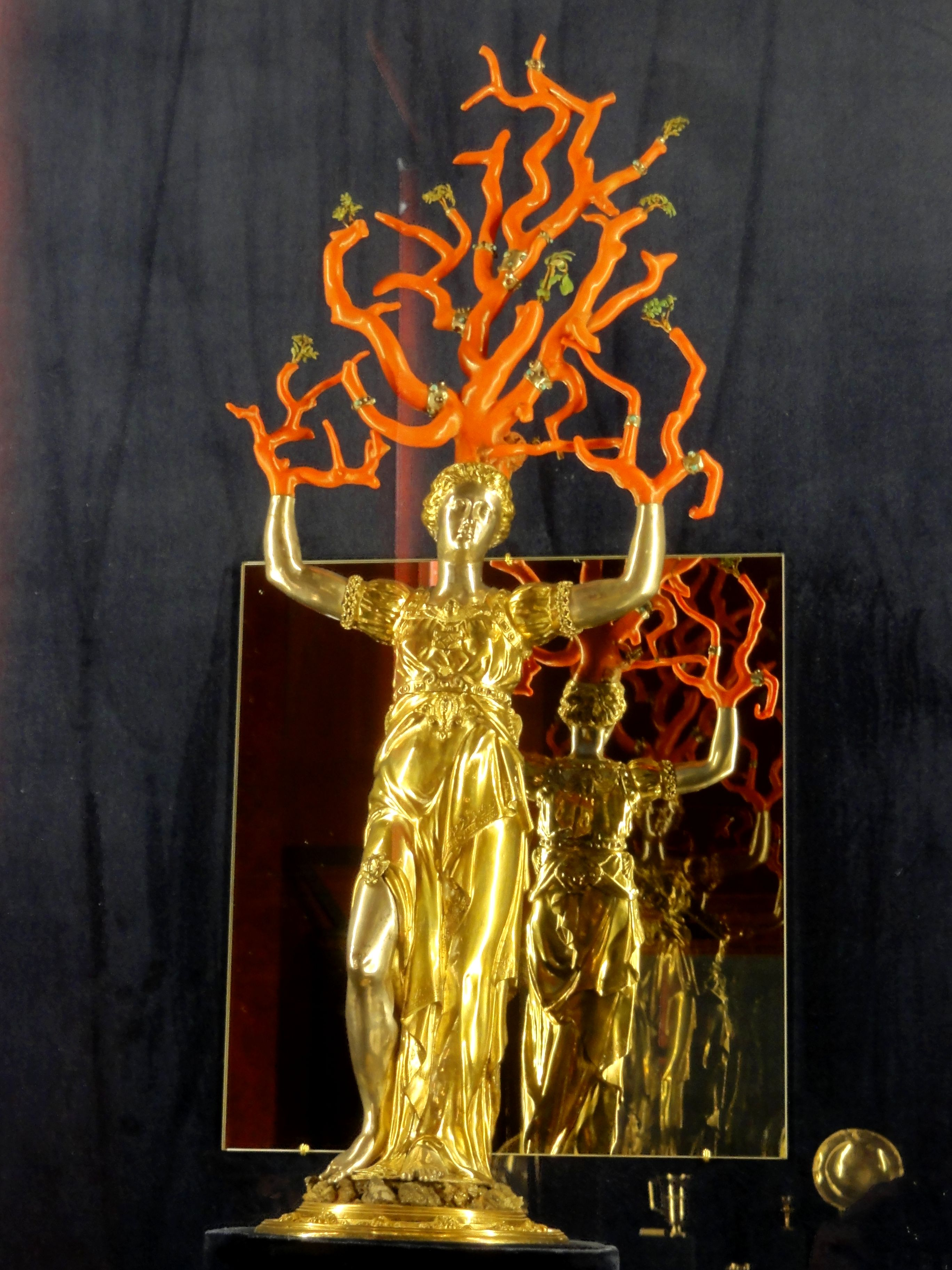 Statuette de Daphnée, Wenzel Jamnitzer, Nuremberg, vers 1570.